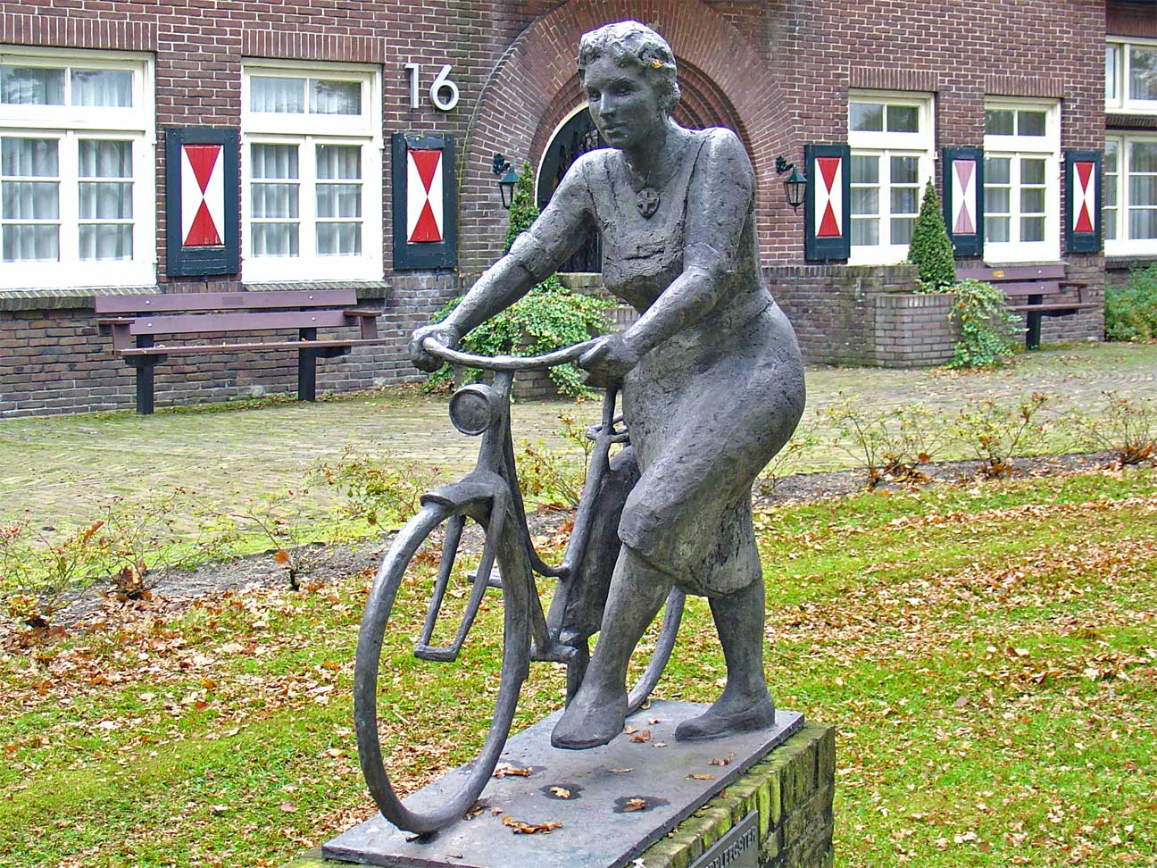 De wijkverpleegster in Westerbork door Bert Kiewiet (1992)